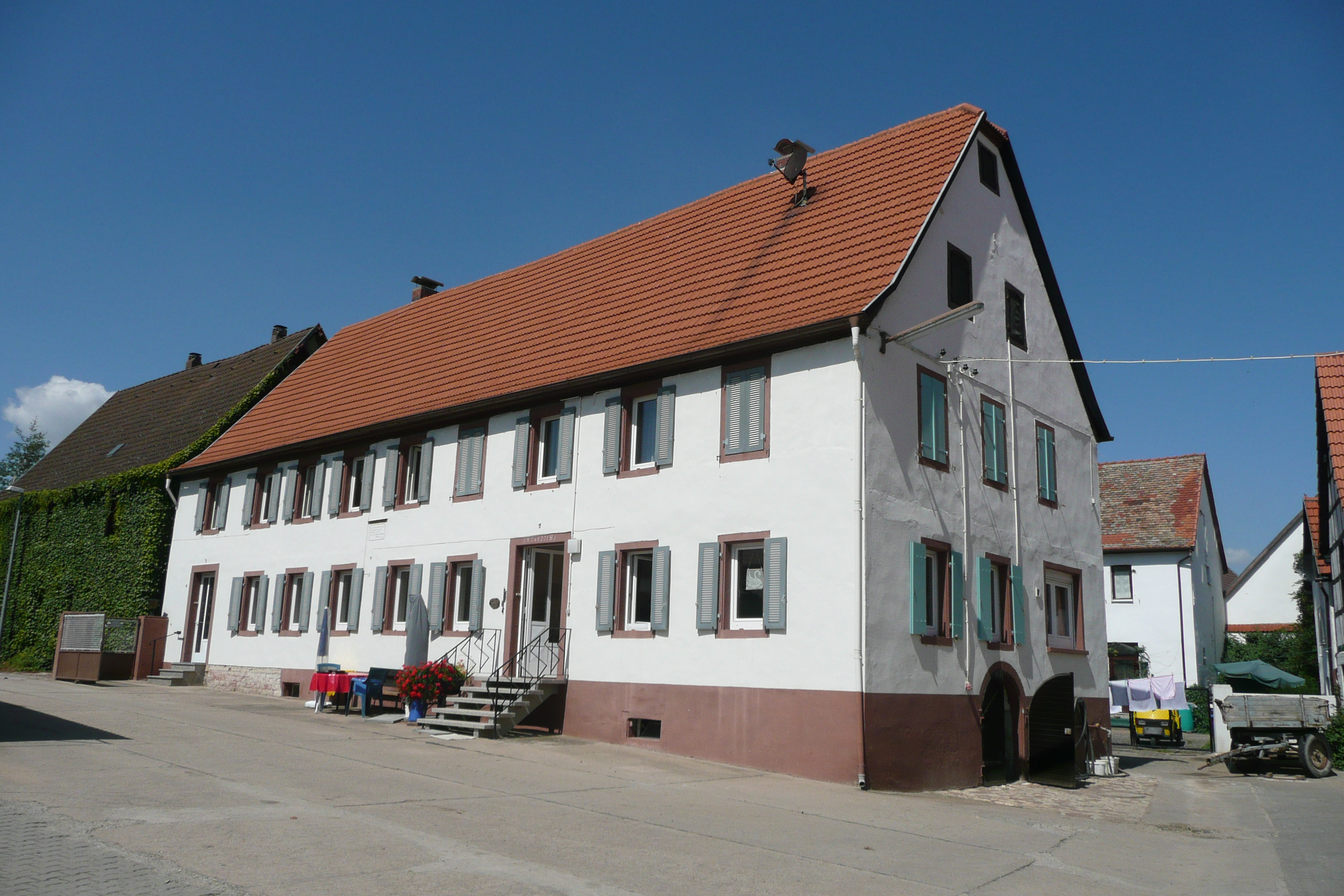 Heute ältester Bauernhof in Ibersheim, errichtet von Peter Opmann: Scheune von 1716, Wohnhaus von 1717 (nach Inschriften an Scheune und Wohnhaus)